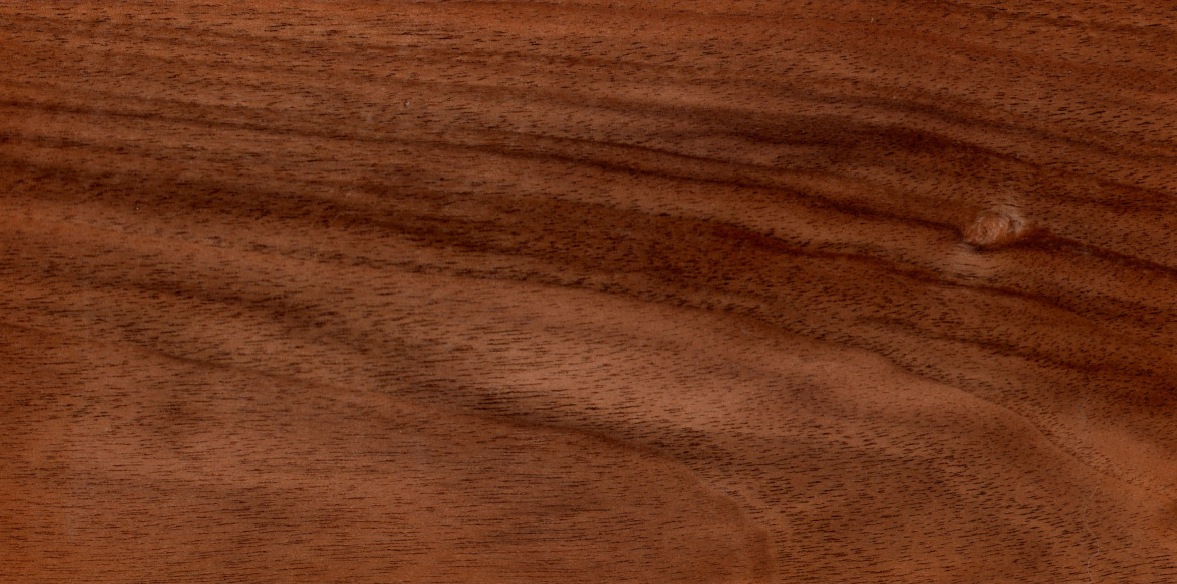 Wood of Juglans regia